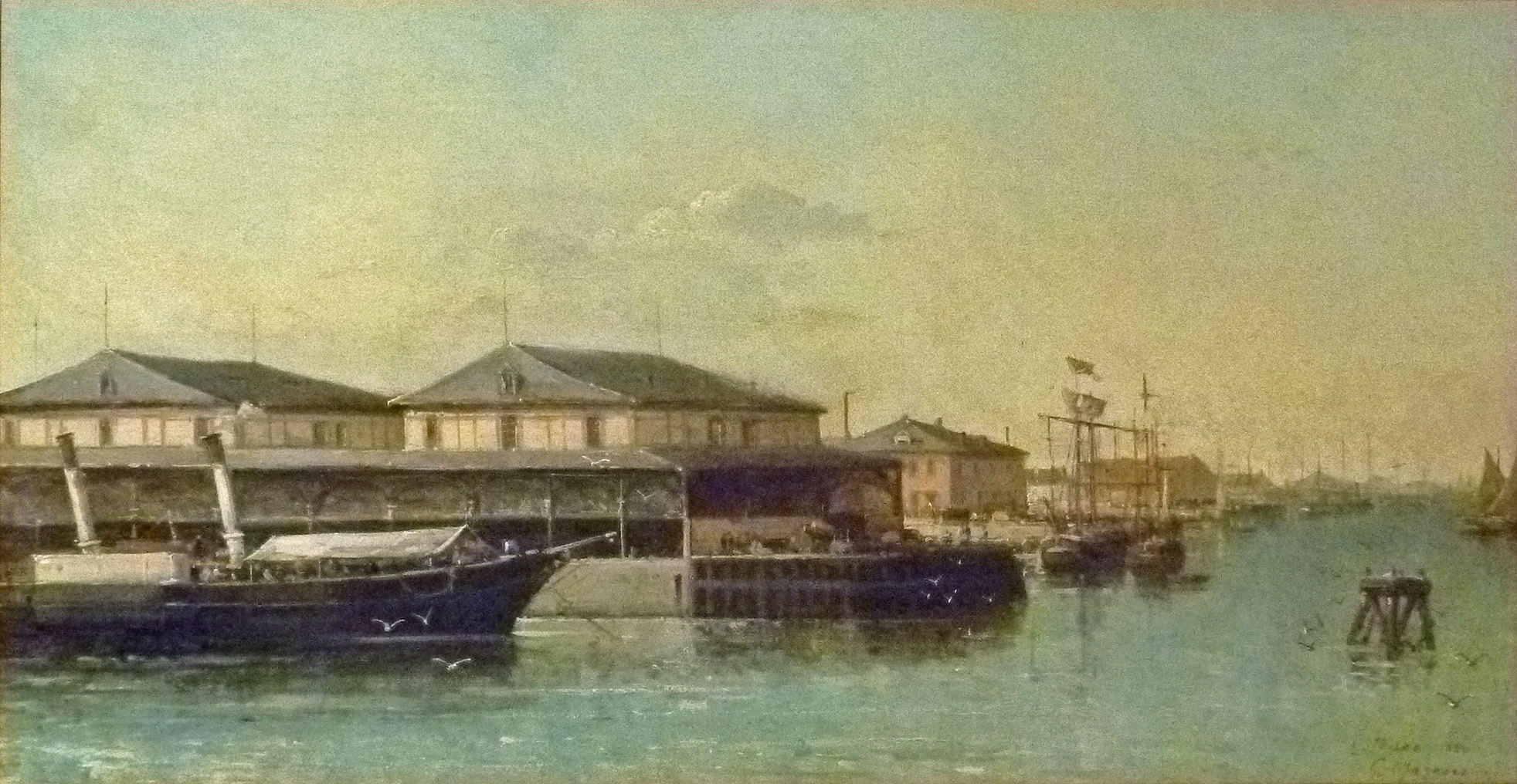 "De handelsdokken te Oostende" (ca. 1884); olieverf op doek door de Franse kunstschilder Gustave Mascart (1834-1914); collectie Stad Oostende in MuZee